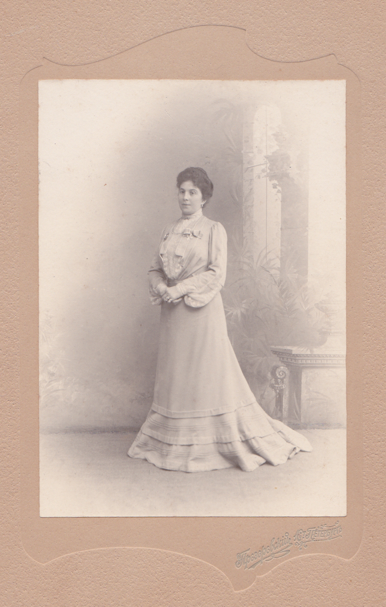 Елизавета Викторовна Лоферт-Винчи, последняя начальница приюта "Господа нашего Иисуса Христа в память отрока Василия. 1910 г.